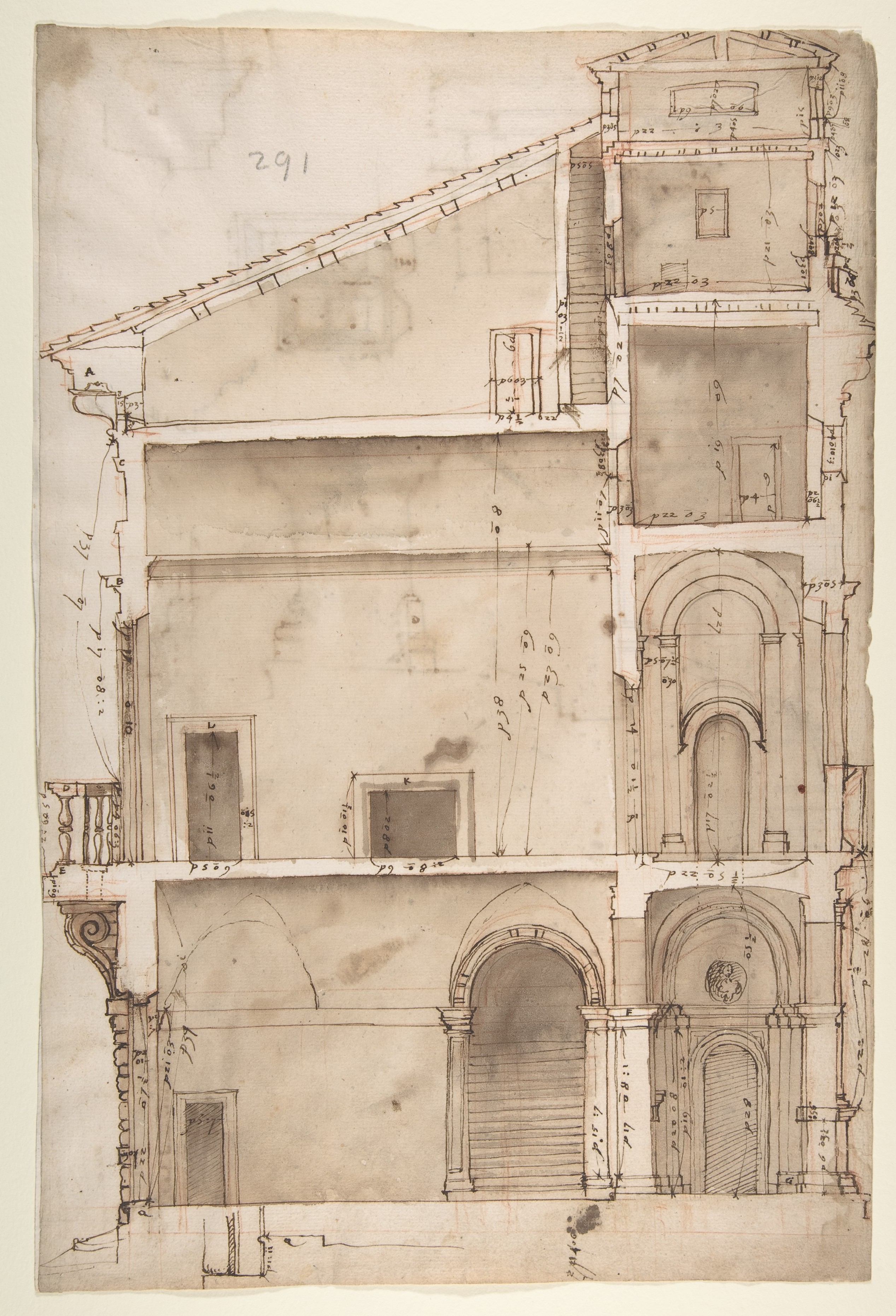 Drawing; Drawings